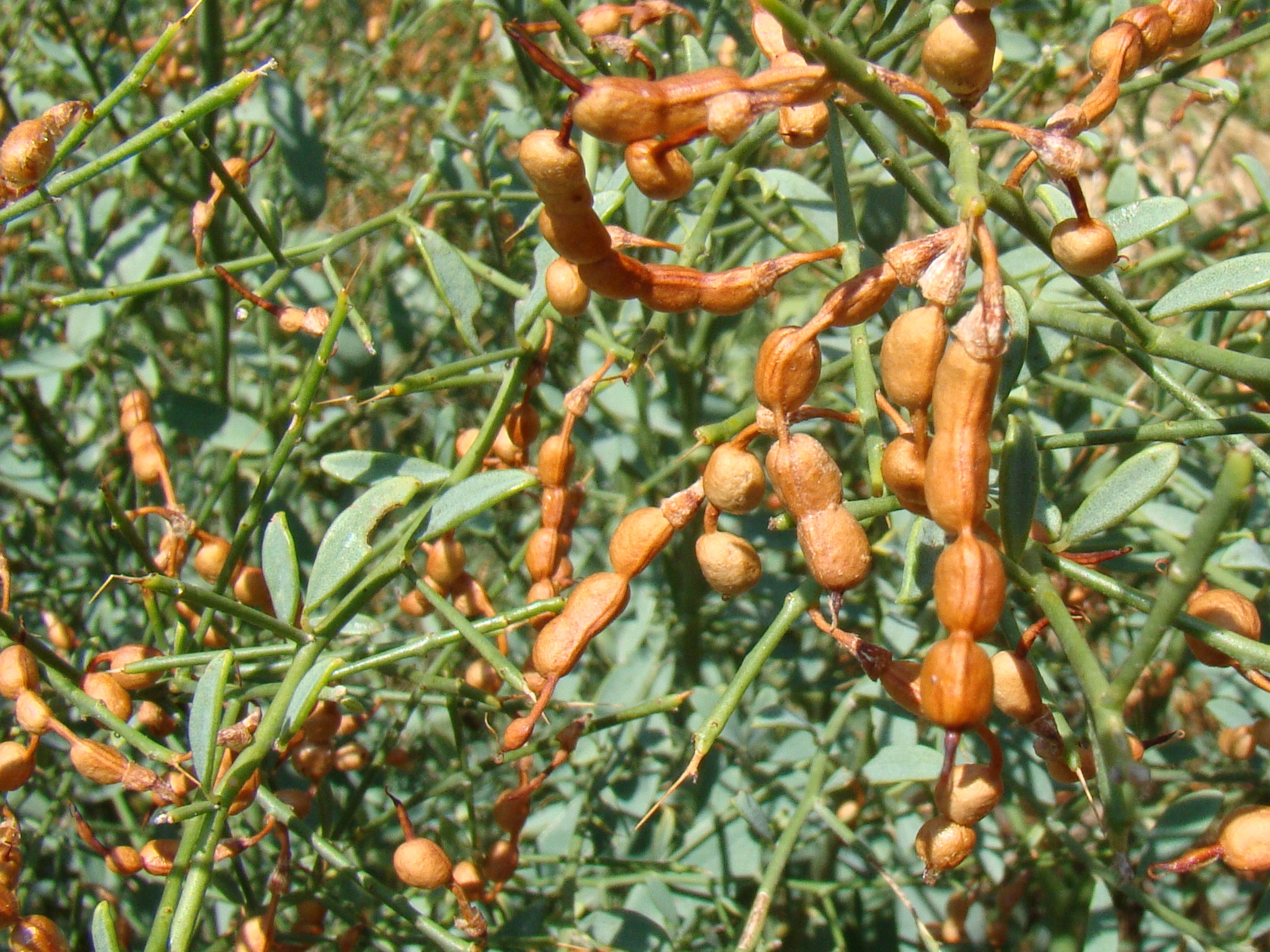 Верблюжья колючка (Alhagi sp.). Окрестости города Байконур, Казахстан